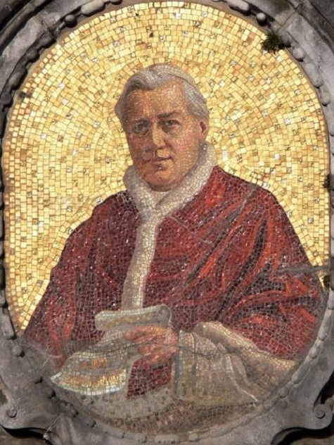 Mosaïque représentant le pape Pie X à Lourdes (entrée de la crypte)